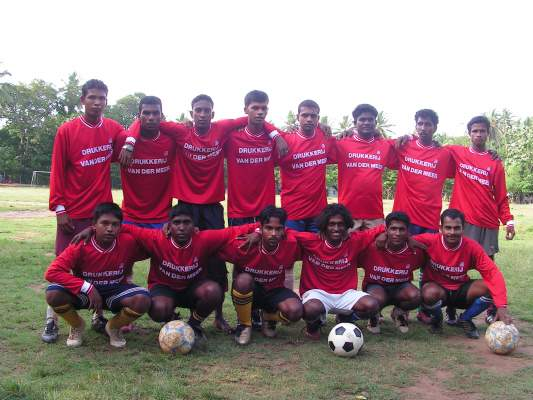 een voetbal team in het nieuw